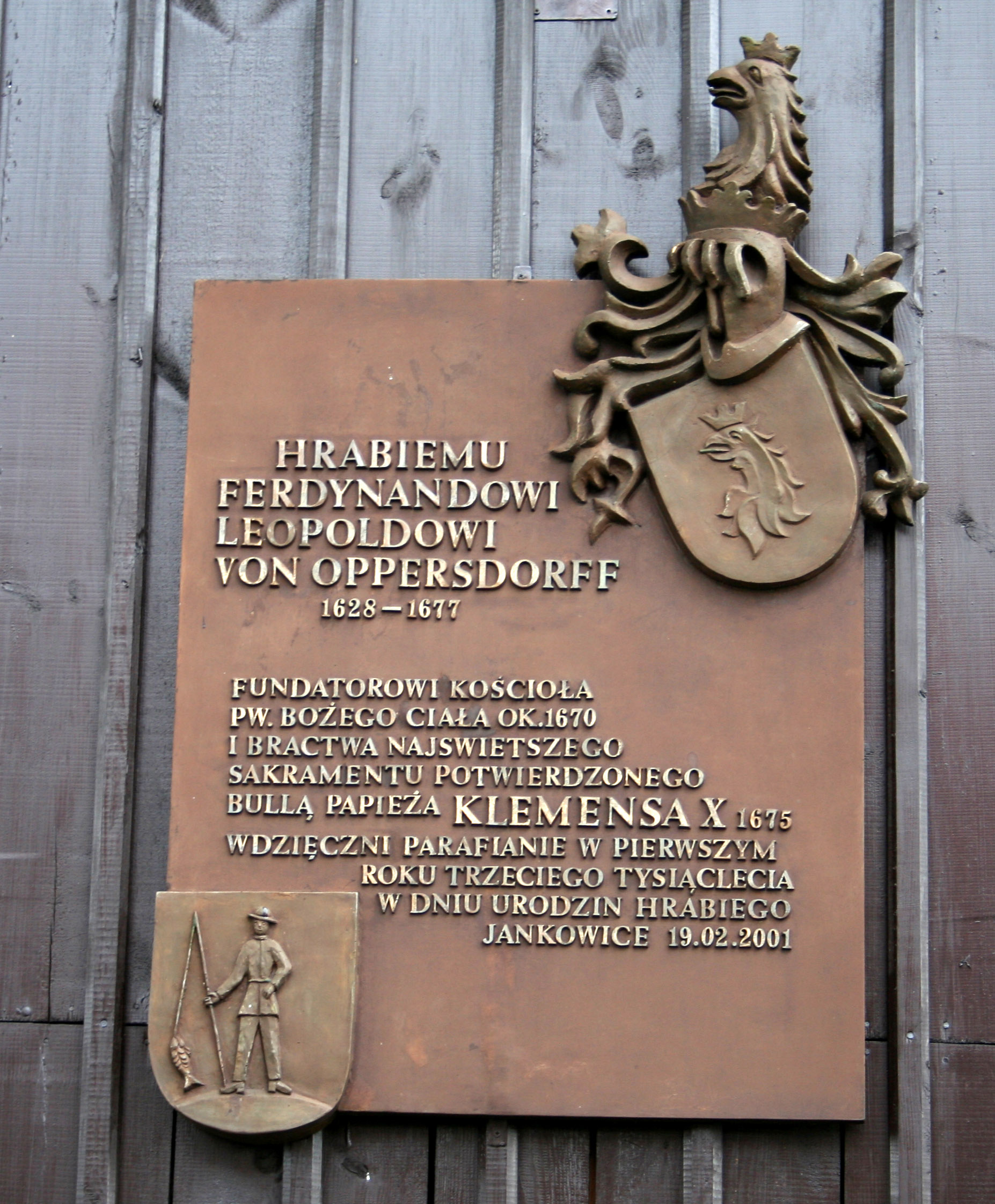 Tablica pamiątkowa przy Sanktuarium Bożego Ciała w Jankowicach Rybnickich